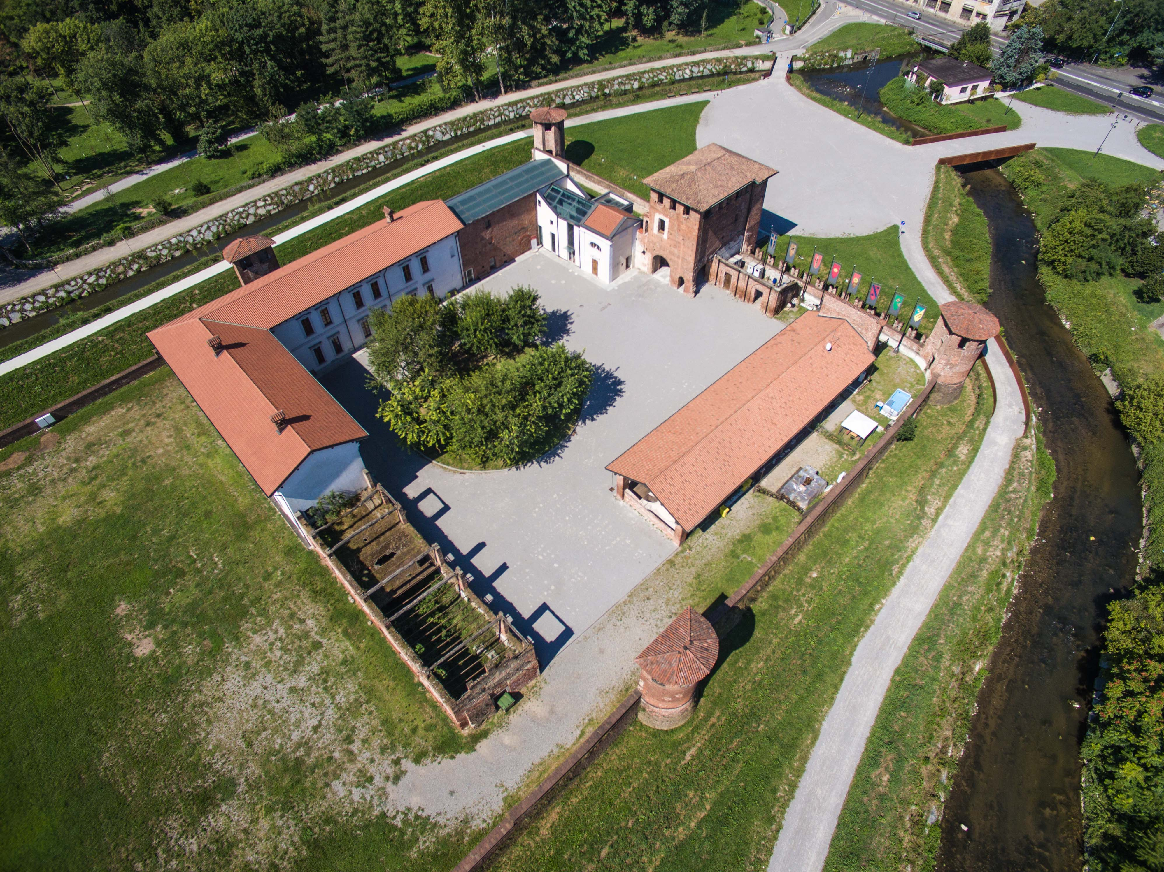 Vista dall'alto del castello di Legnano, effettuata da Northern Drones, con base operativa in Sydney, NSW